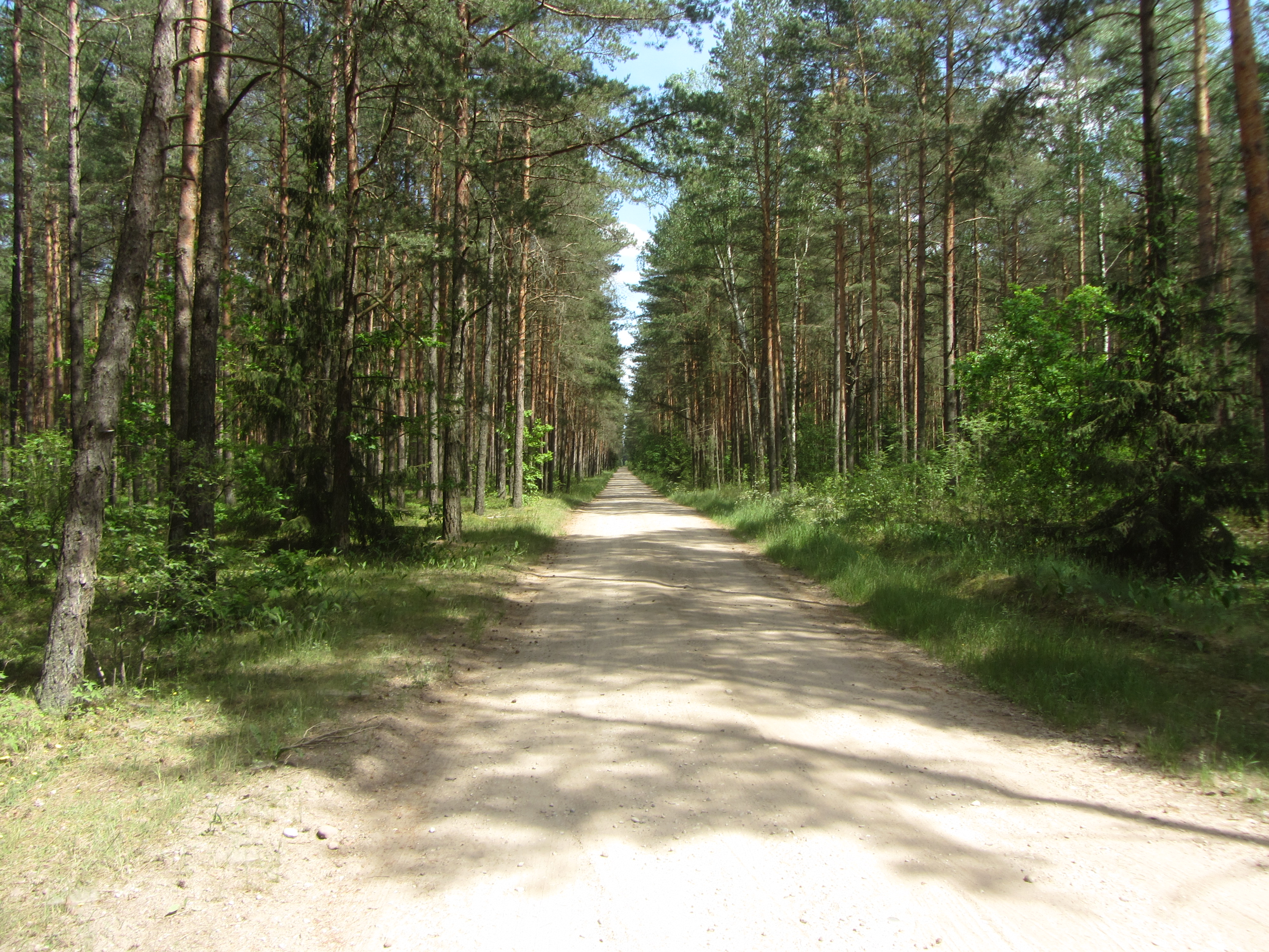 Dumsių sen., Lithuania